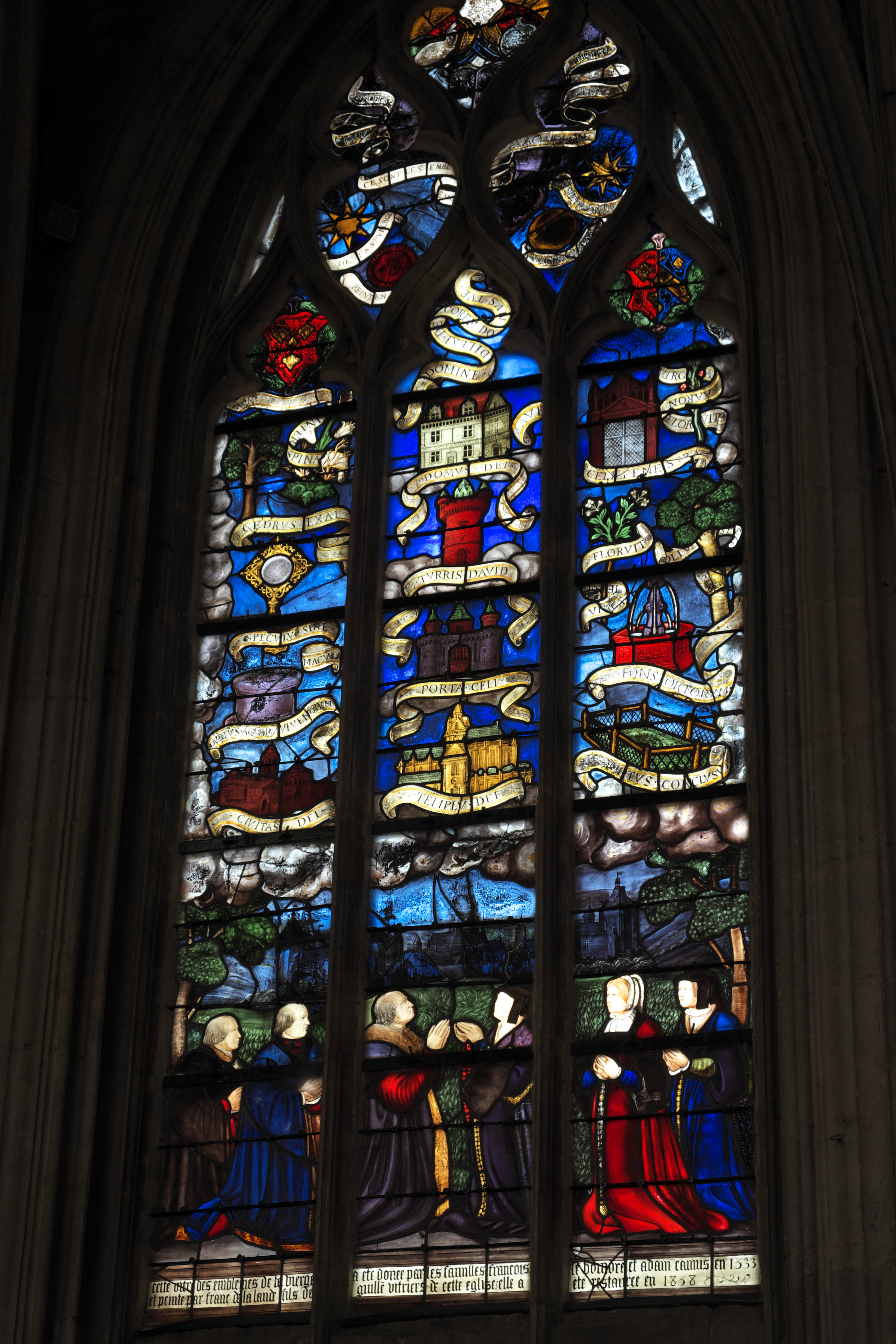 Katholische Pfarrkirche Notre-Dame-des-Marais in La Ferté-Bernard im Département Sarthe (Pays de la Loire/Frankreich), Bleiglasfenster (baie 4) aus der ersten Hälfte des 16. Jahrhunderts, 1858 von Léopold Charles restauriert und ergänzt; Darstellung: Mariensymbole, Stifter